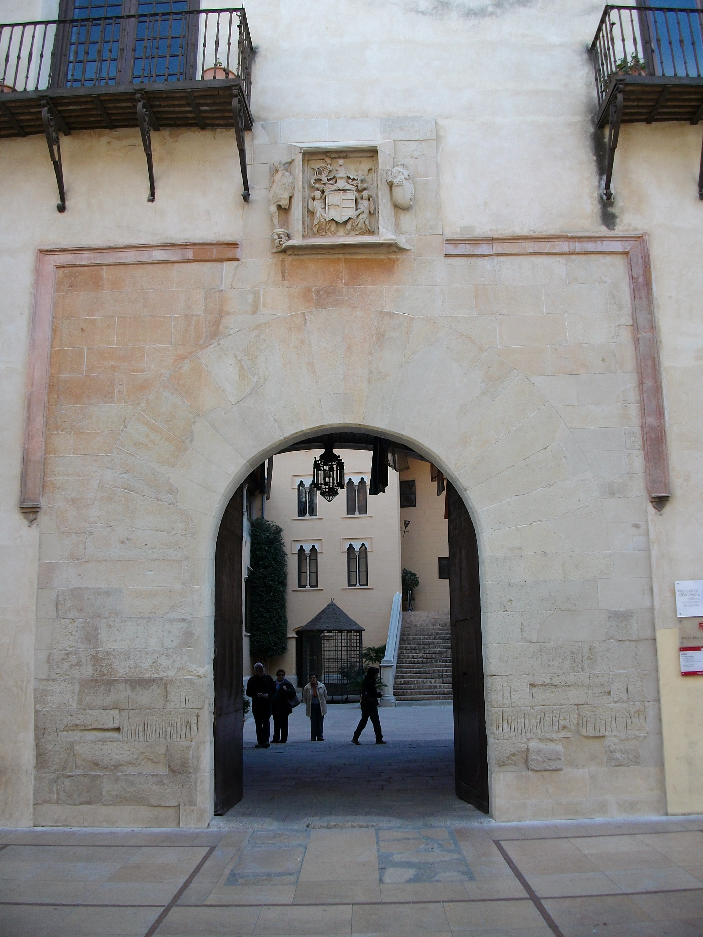 Portada d'entrada al Palau Ducal de Gandia.